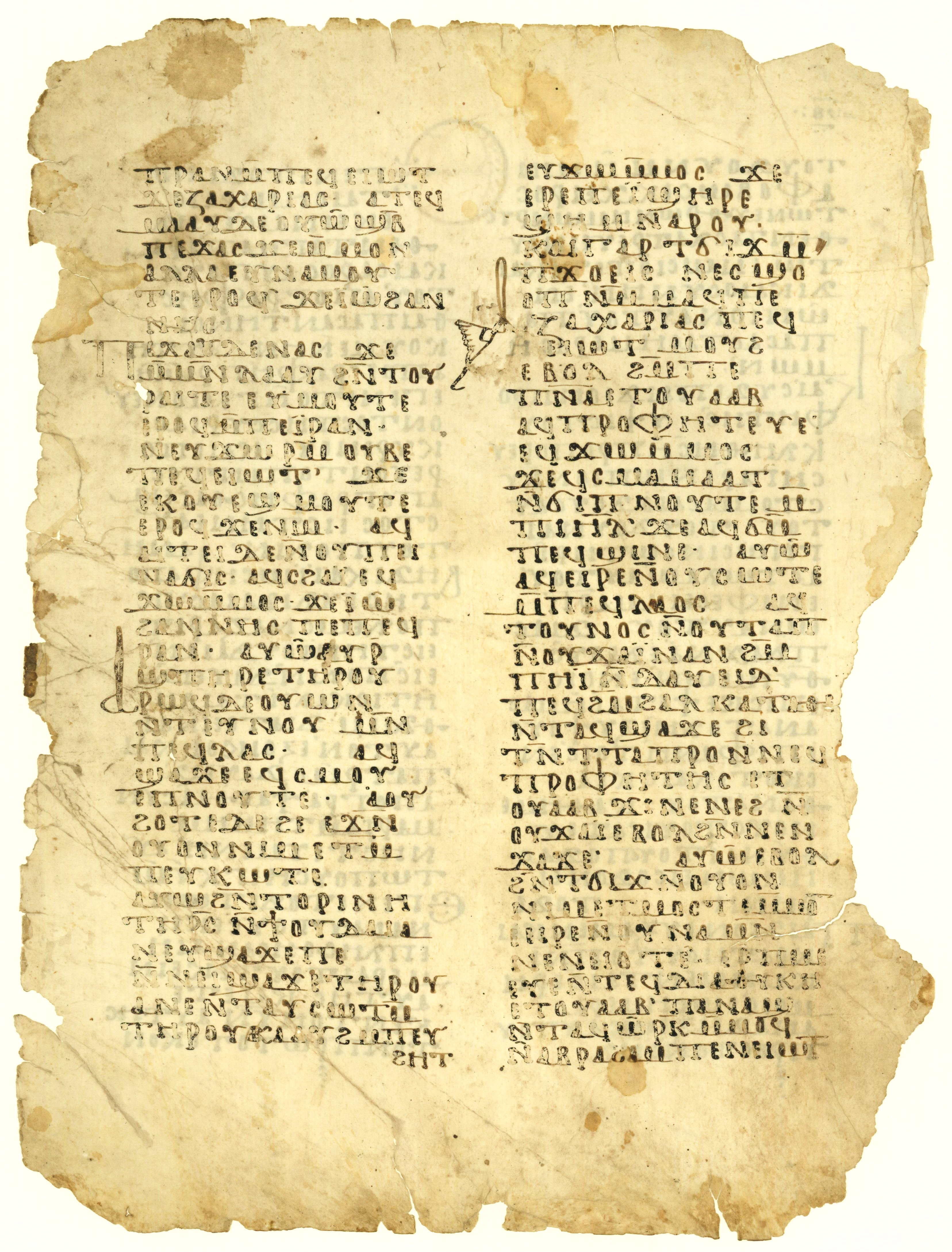 side recto with the text of Luke 1:59-73